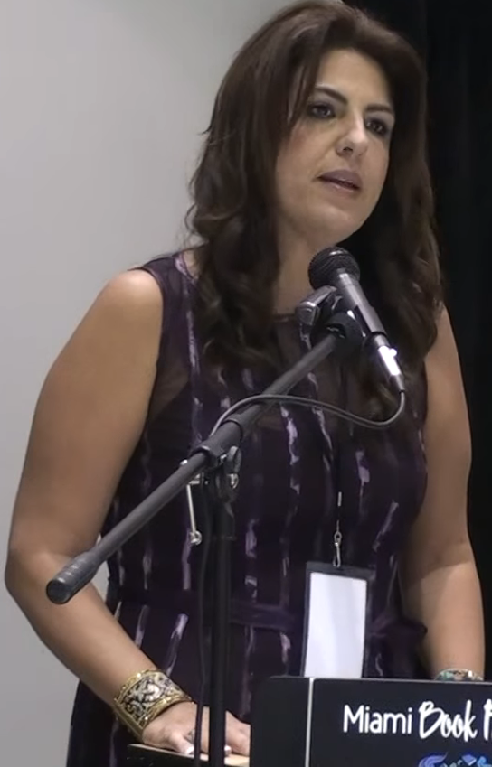 Patricia Poleo en noviembre de 2011.